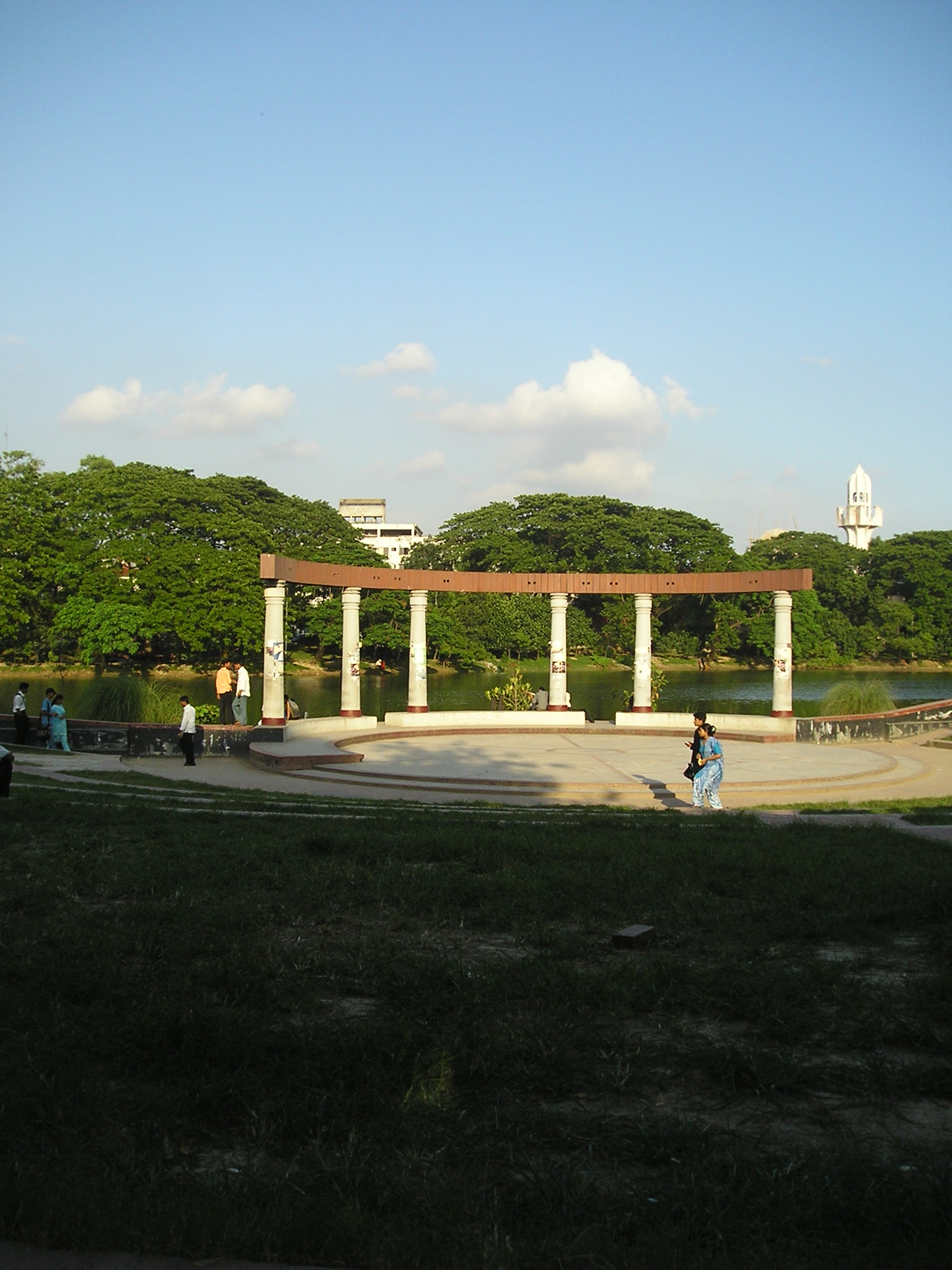 Robindro Sorobor, Dhanmondi Lake, Dhaka, Bangladesh.